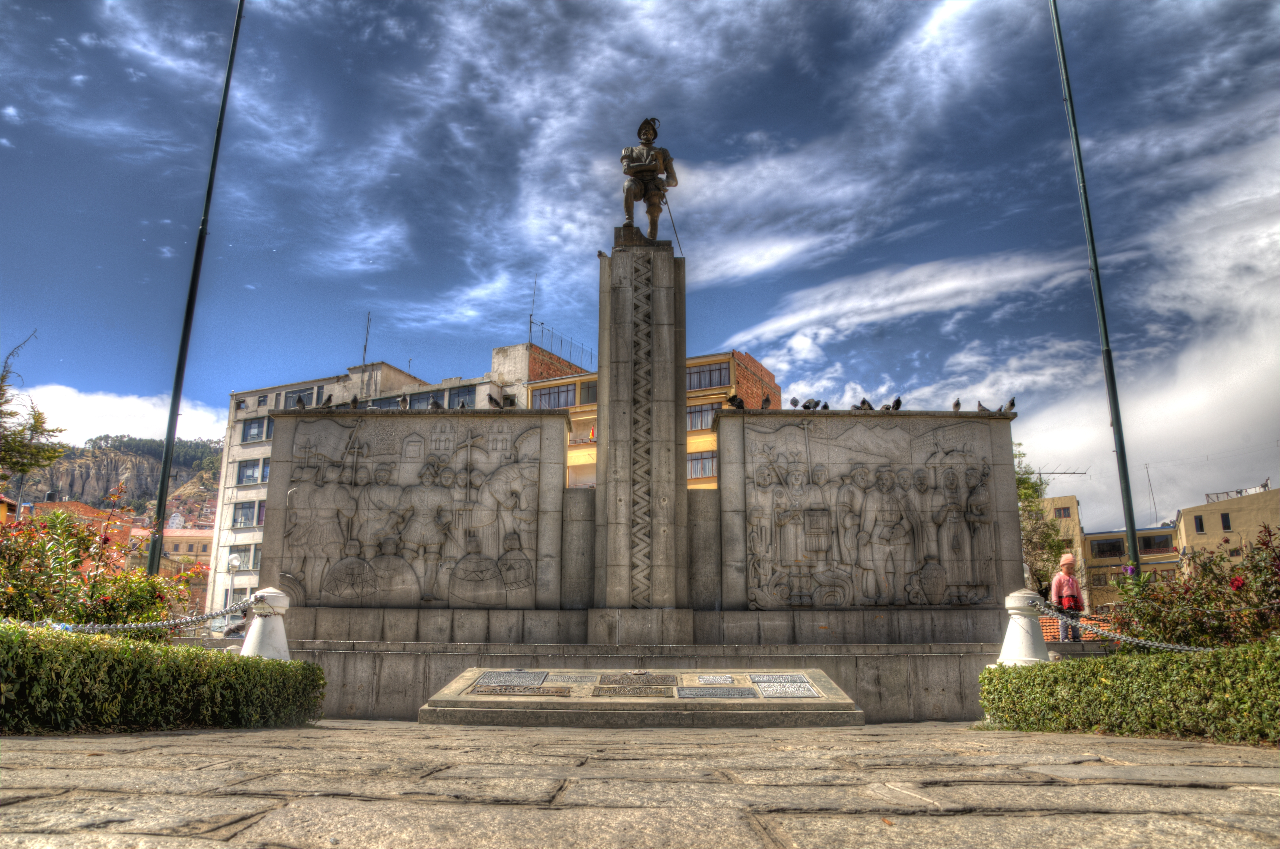 Alonso de Mendoza This medium shows the protected monument with the number L/00-200 in Bolivia.